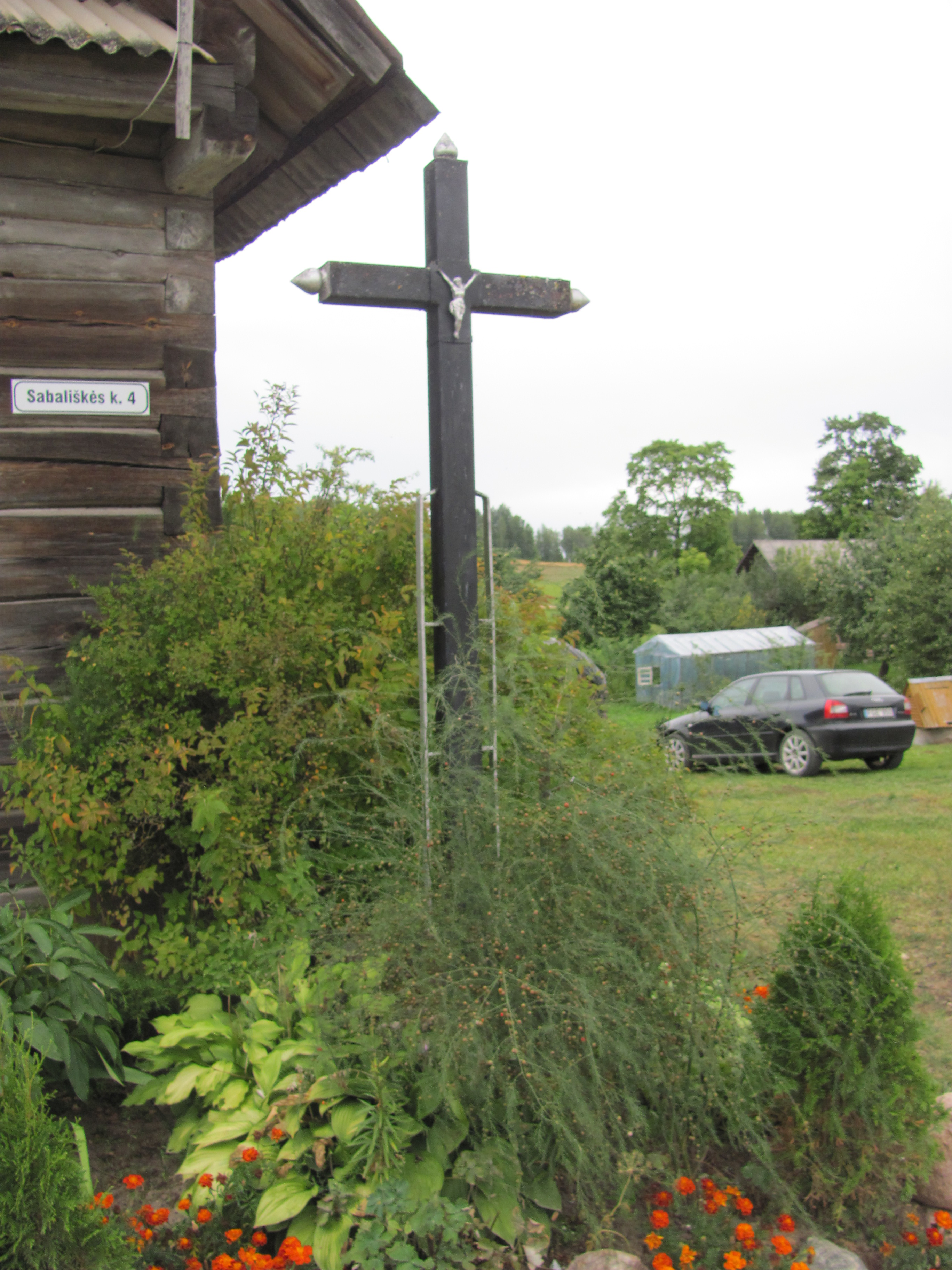 Kazitiškis, Lithuania